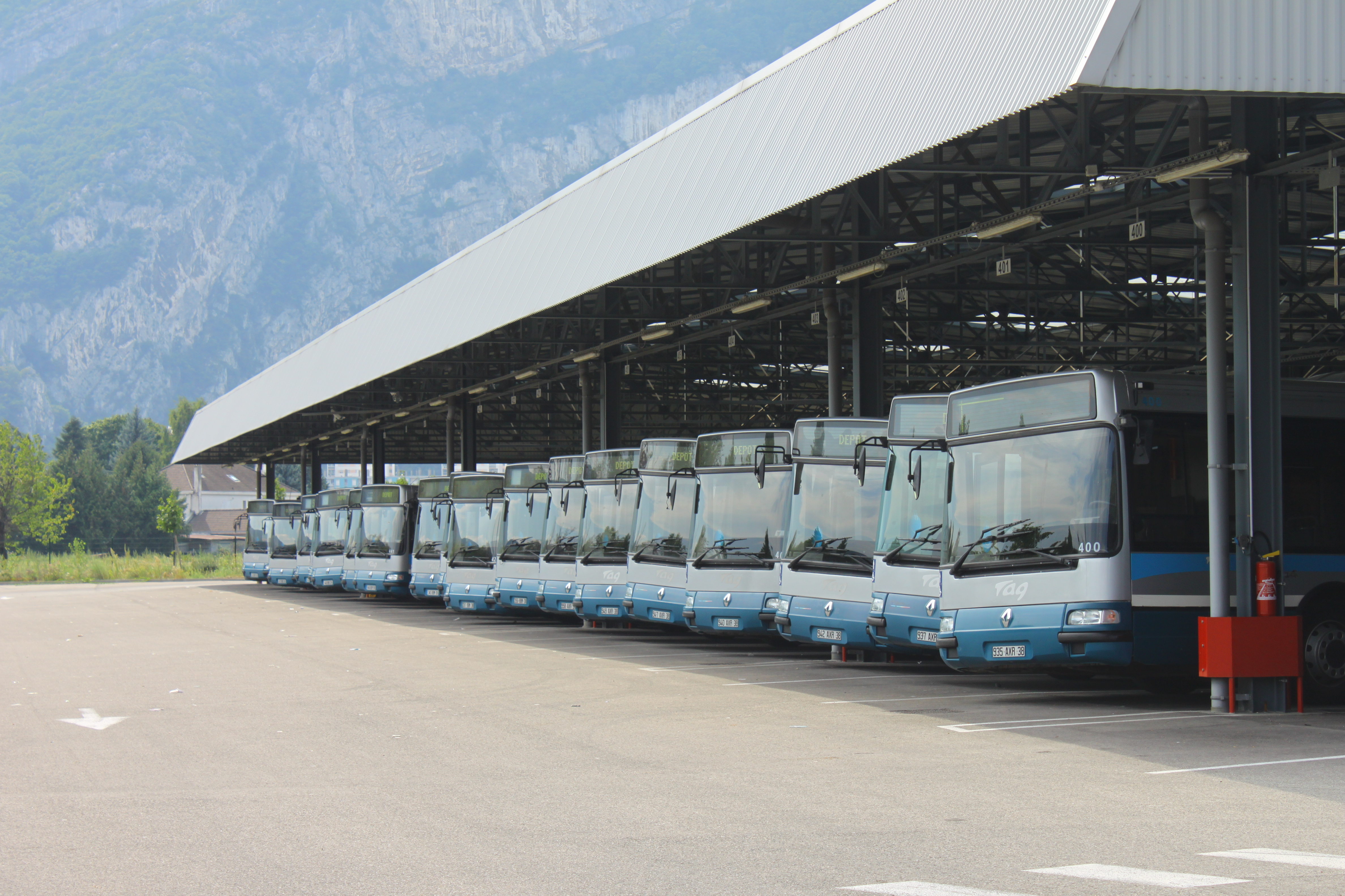 L'un des parking du dépôt de Sassenage du SMTC. Ici, les Agora S.